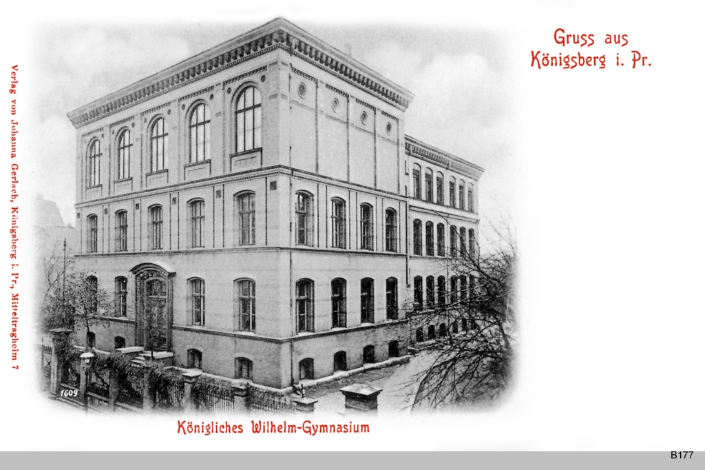 Königsberg